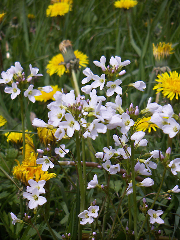 Löwenzahn (Taraxacum officinale agg.) und Wieseschaumkraut (Cardamine pratensis) am 10.5.2005 in der Eifel.